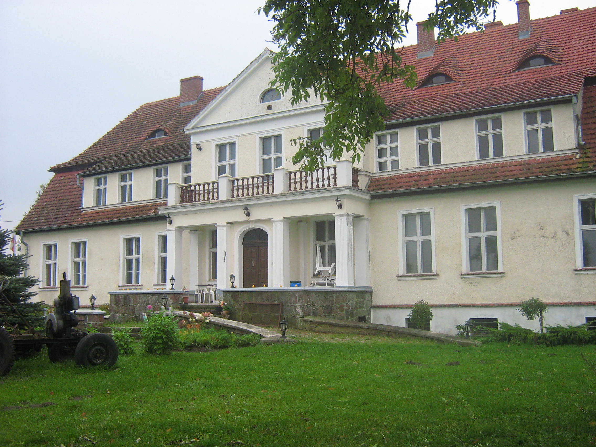 Dwór w Mechowie.